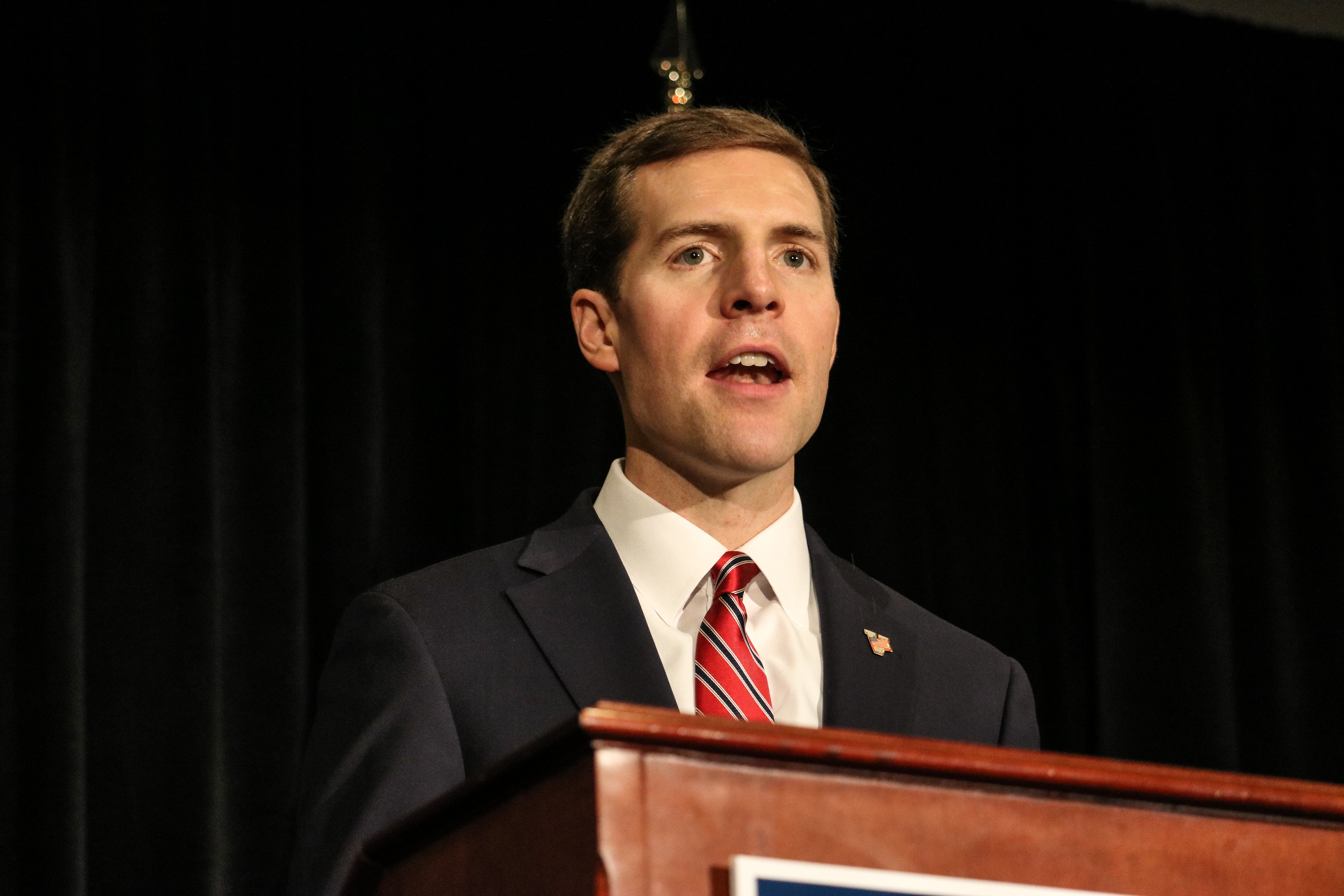 Conor Lamb introduces Former Vice President Joe Biden.